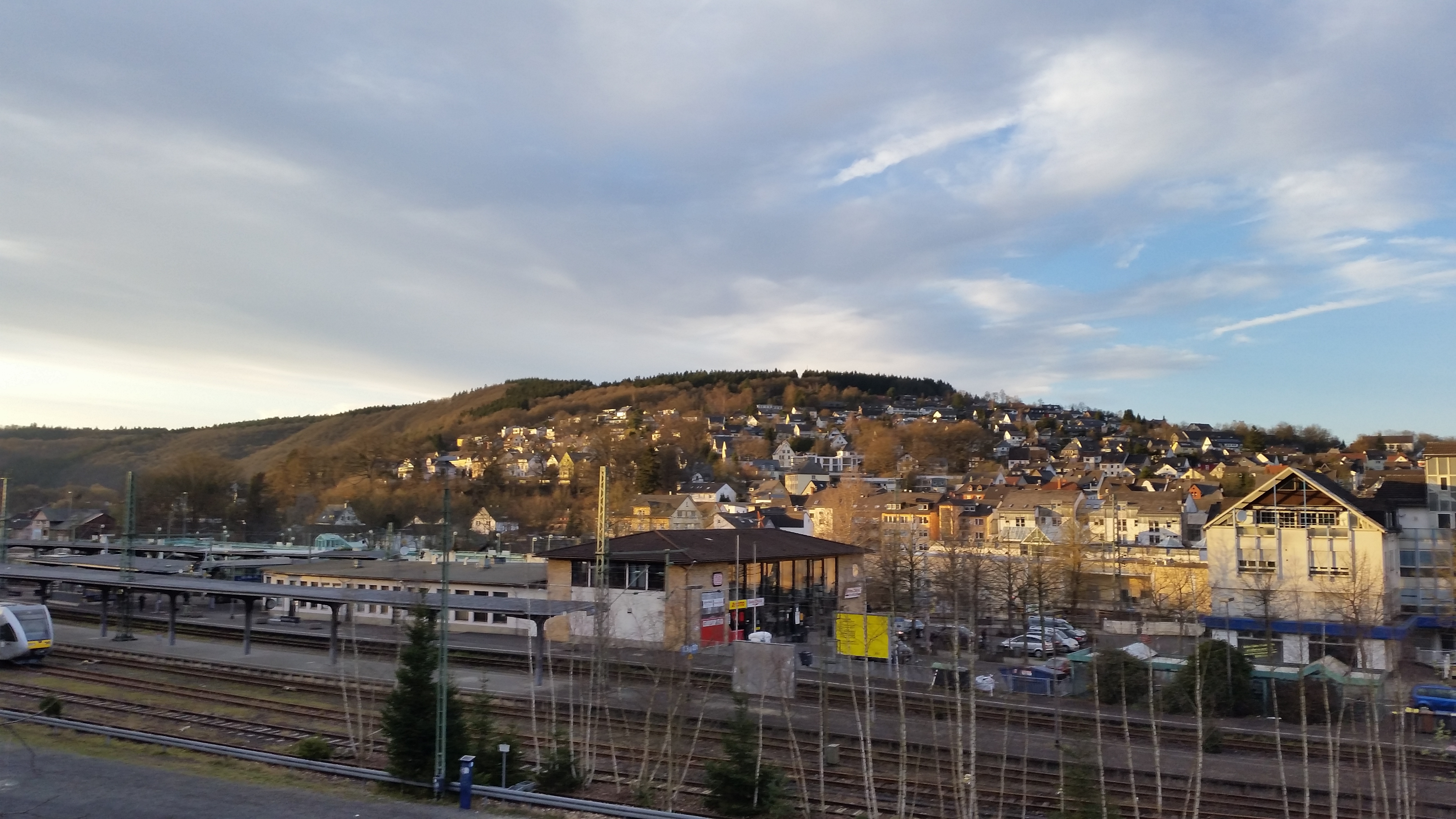 Blick auf Betzdorf inkl. Gleisanlagen der Deutschen Bahn sowie Molzberg im Hintergrund, März 2016